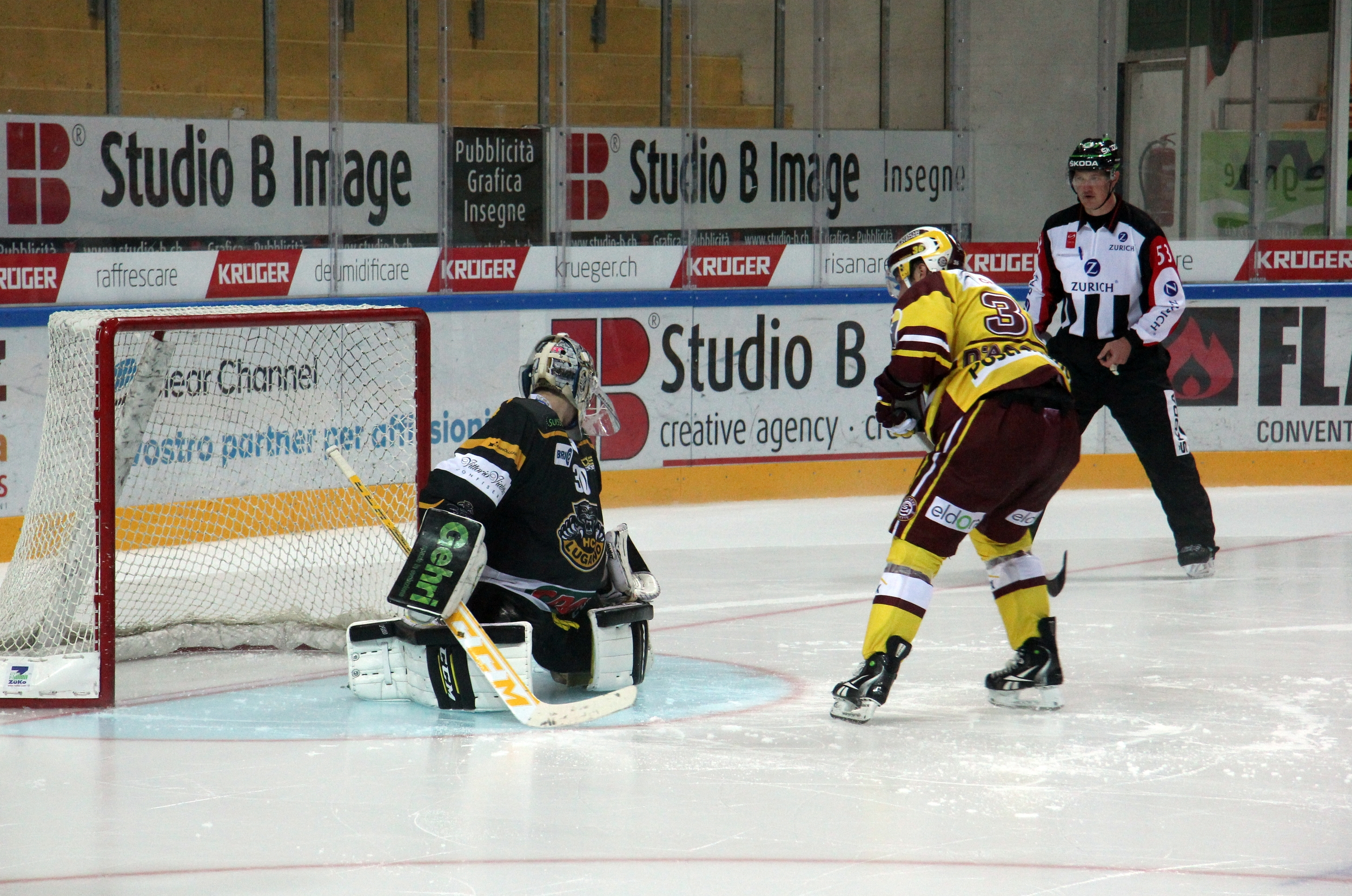 Elvis Merzlikins (L 30), Matt D'Agostini (G 36), Lars Brüggemann (R 53). Tir au but.